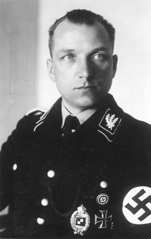 August Heißmeyer SS-Gruppenführer Heissmeyer [Porträt August Heißmeyer als SS-Gruppenführer mit Orden (vor 1940)] Abgebildete Personen: Heißmeyer, August: SS-Obergruppenführer, Chef des SS-Hauptamtes, Deutschland